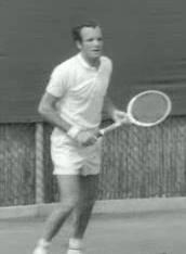 Tom Okker